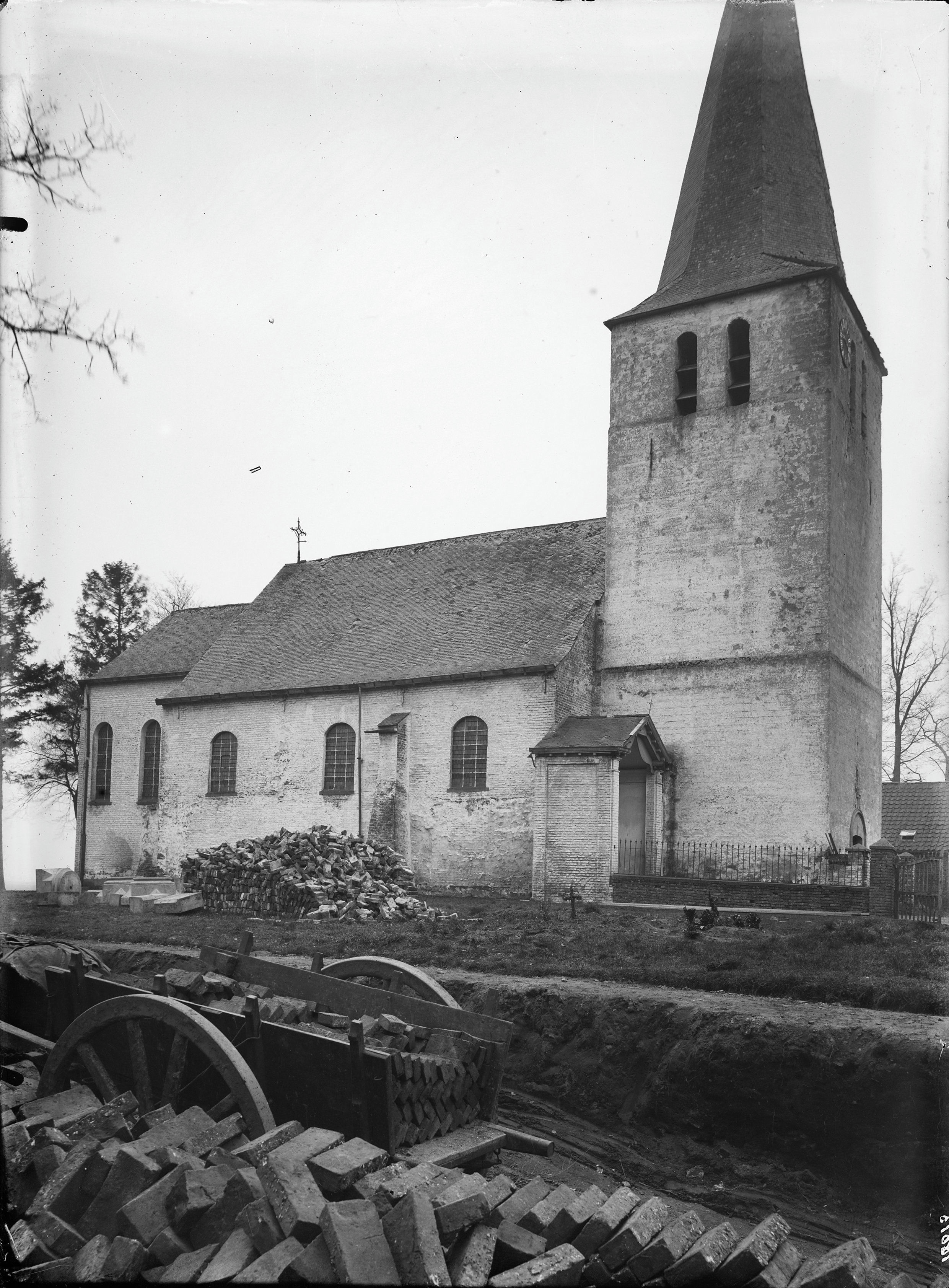 Kerken: Overzicht van inmiddels afgebroken kerk vanuit het noordwesten (opmerking: Collectie Mulder)